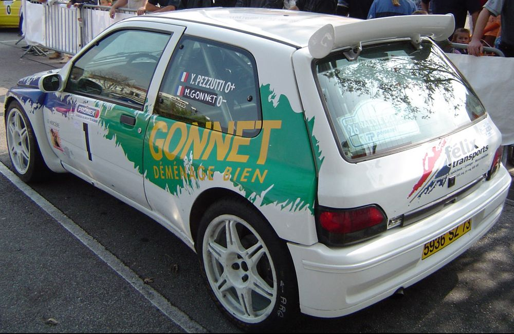 Véhicule de course : Renault Clio Maxi